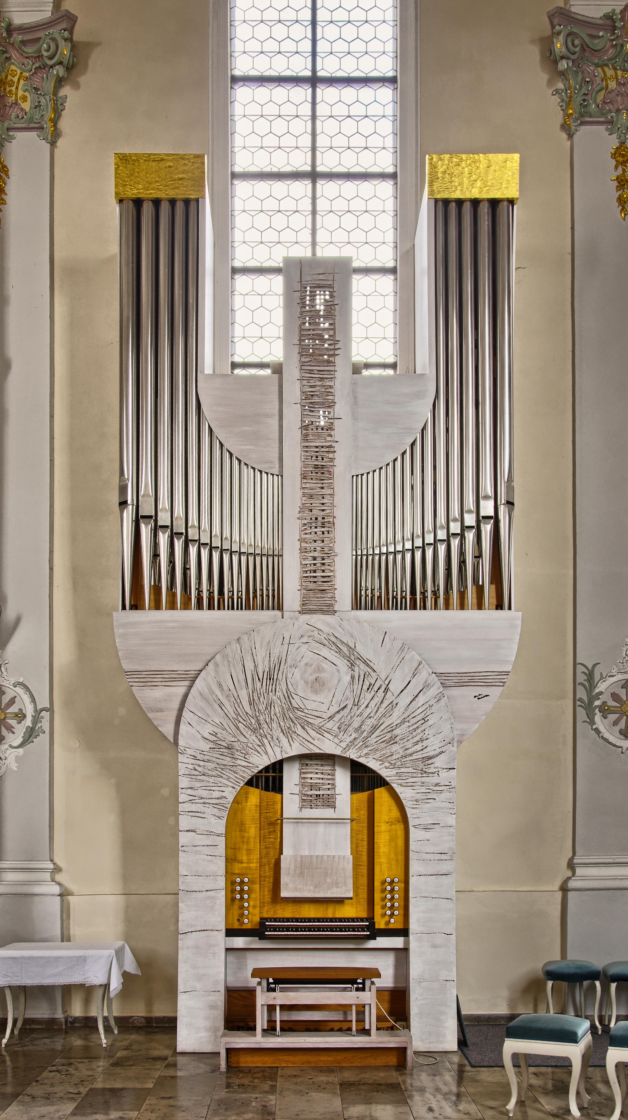 Bilder aus der katholischen Kirche St. Alexius in Herbolzheim